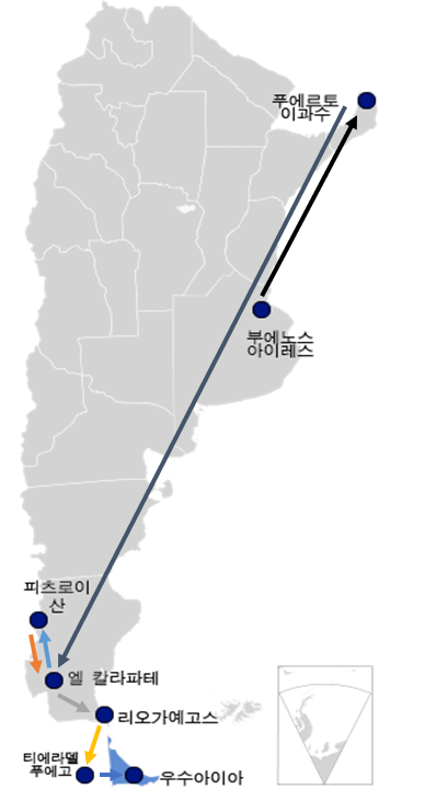 트래블러 시즌 2, 아르헨티나 지도입니다.